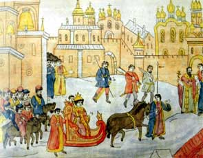 Брачный поезд царя Михаила Федоровича Описание в лицах... Л. 23 Миниатюра из кн. “Описание в лицах торжества, проходившего в 1626 г.”